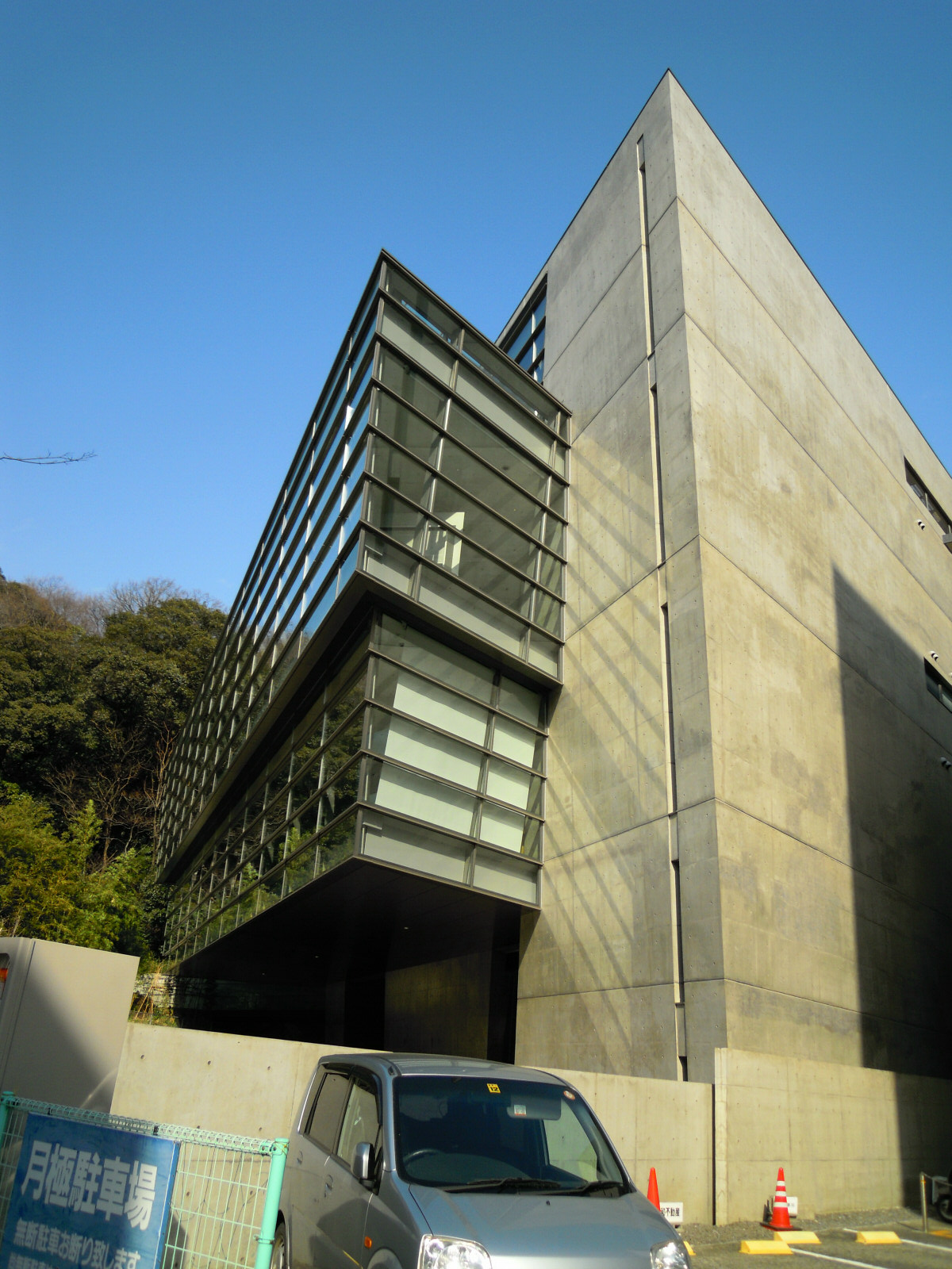 Sakanouenokumo museum